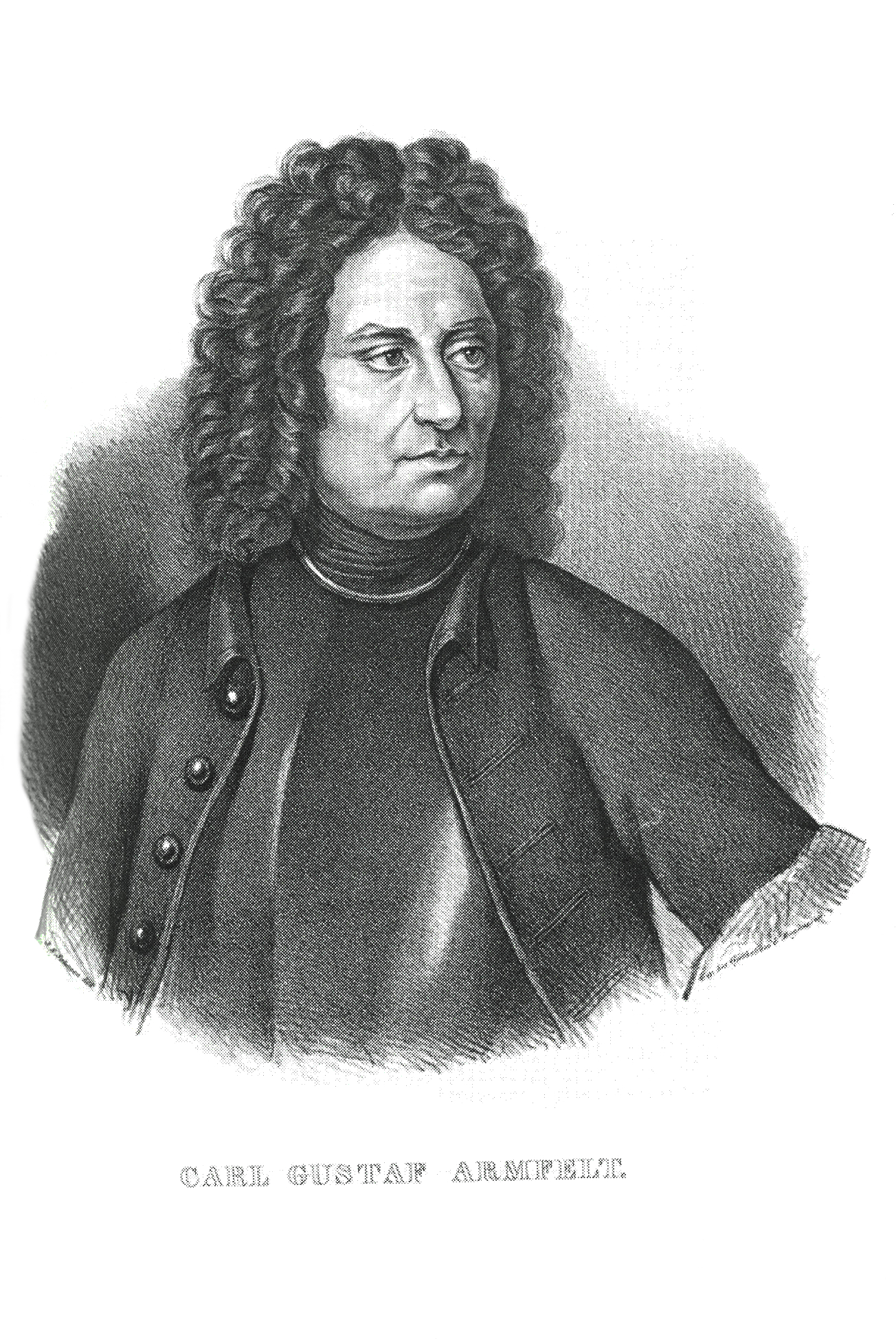 Carl Gustaf Armfeldt.